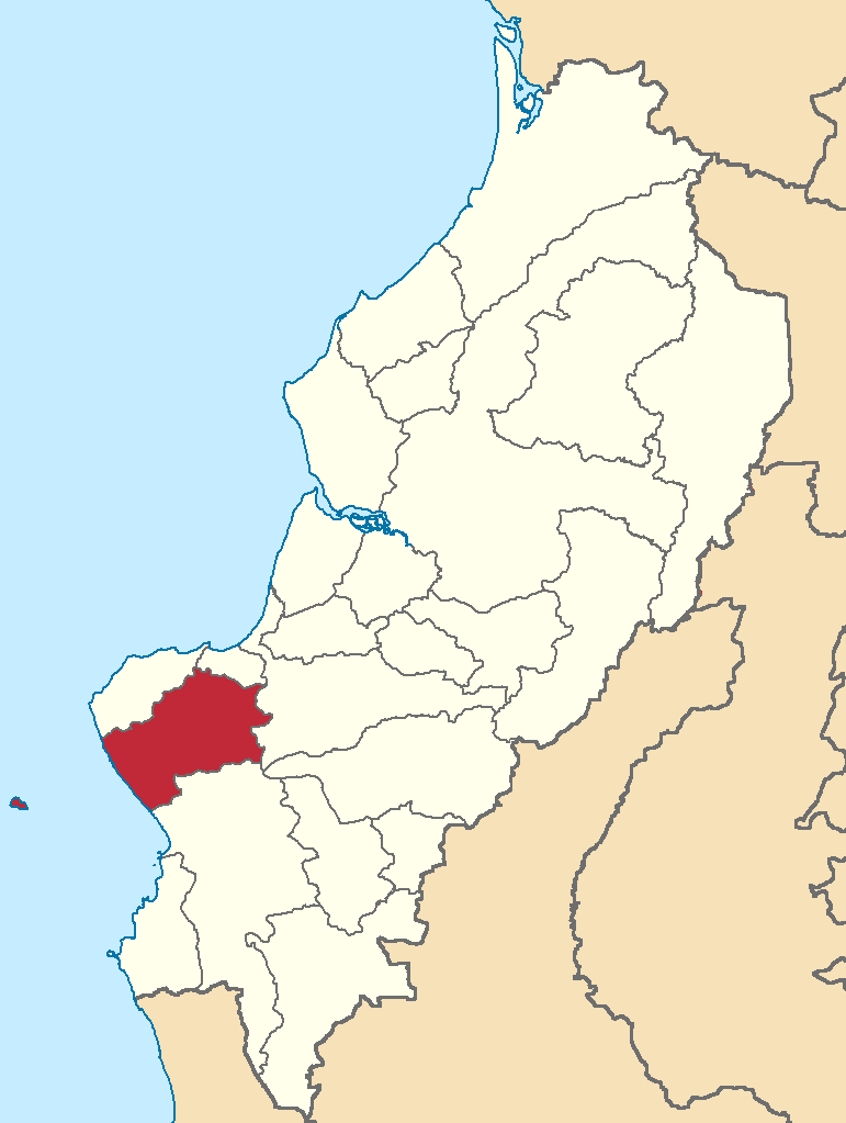 Mapa localizador del cantón en Manabí, Ecuador